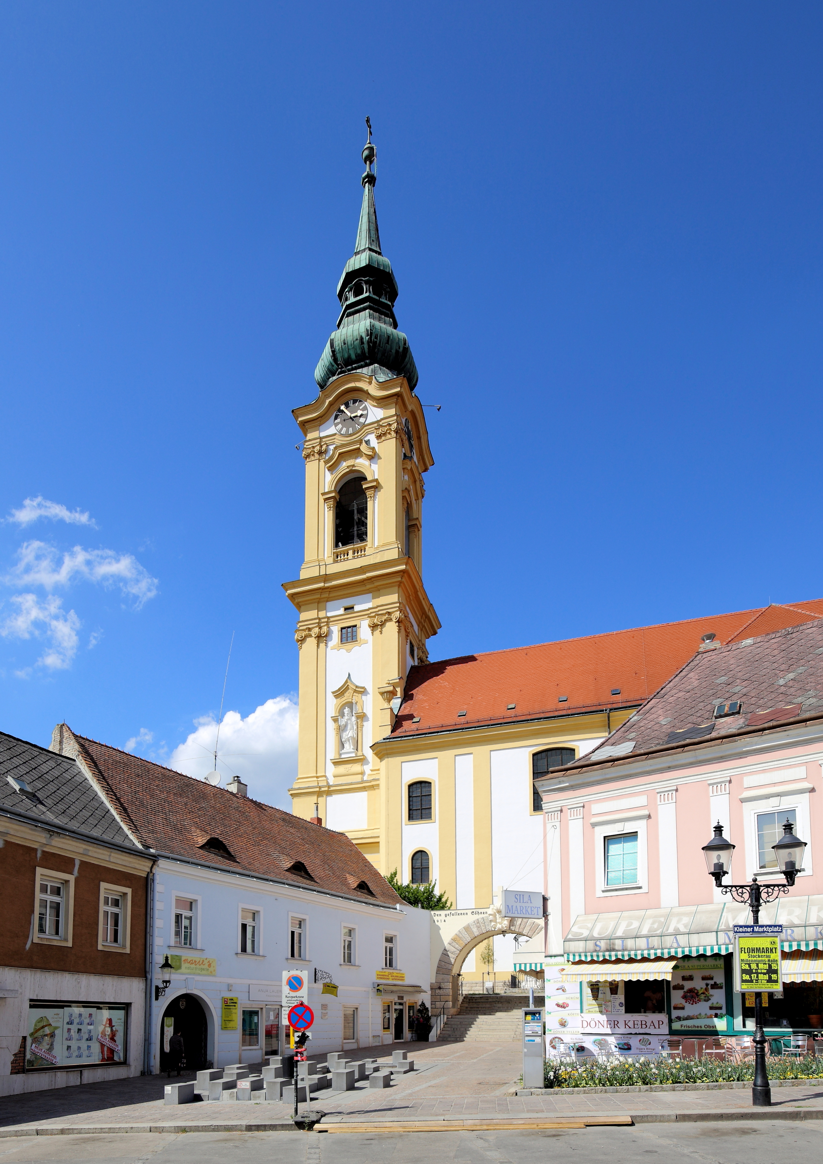 Südsüdostansicht der katholischen Stadtpfarrkirche hl. Stephan in der niederösterreichischen Stadt Stockerau. Eine spätbarocke-frühklassizistische Saalkirche auf einem Hügel inmitten der Altstadt. Der vorgestellte und stadtbildbeherrschende Westturm wurde von 1722 bis 1725 von dem Baumeister Franz Jänggl errichtet und ist mit 88 Meter der höchste Kirchturm Niederösterreichs. 1777/78 erfolgte der Abbruch des gotischen Langhauses und anschließend der Neubau durch den Wiener Baumeister Peter Mollner.